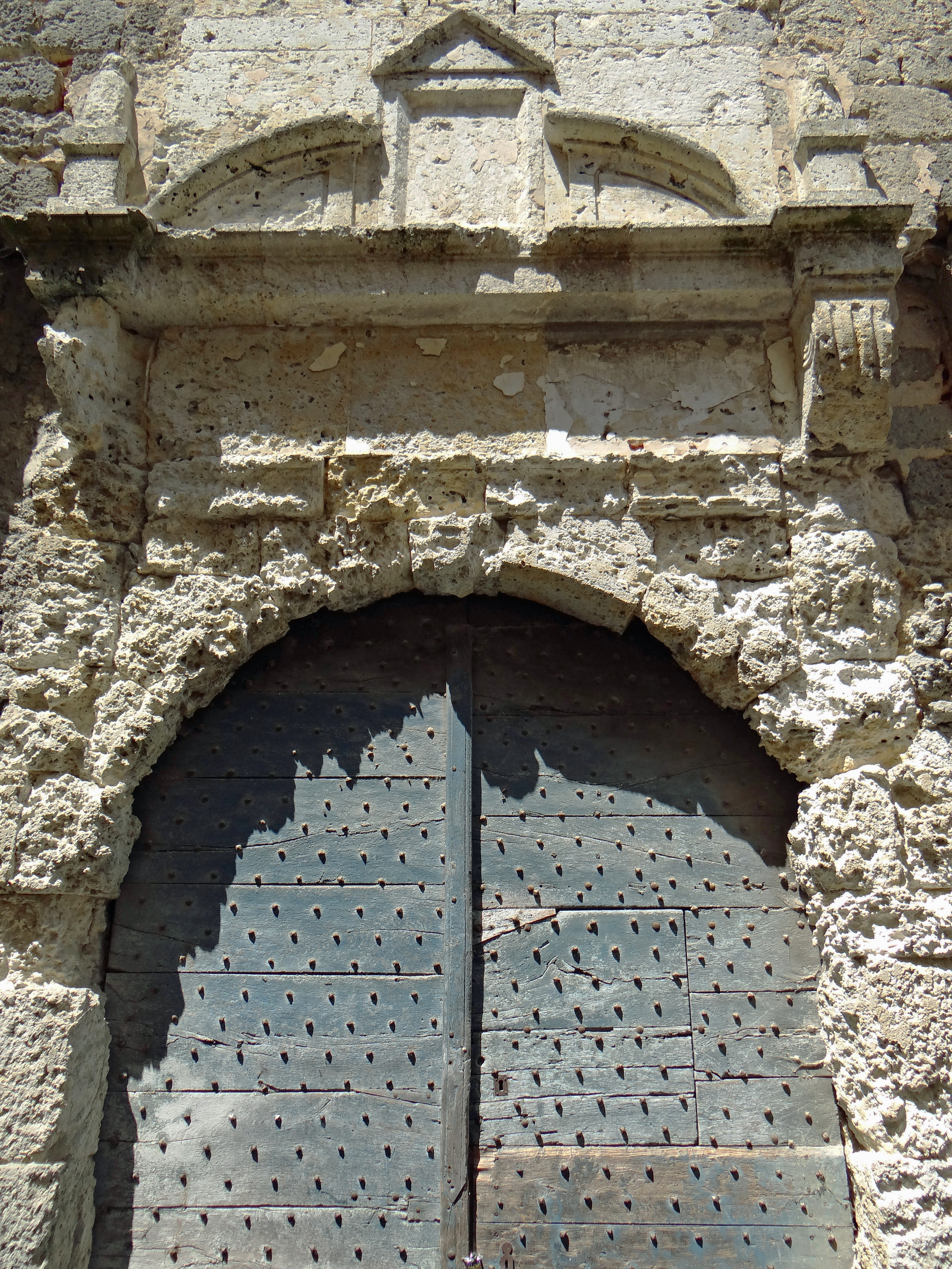 Nérac - Mairerie - Porte, rue de l'Ecole